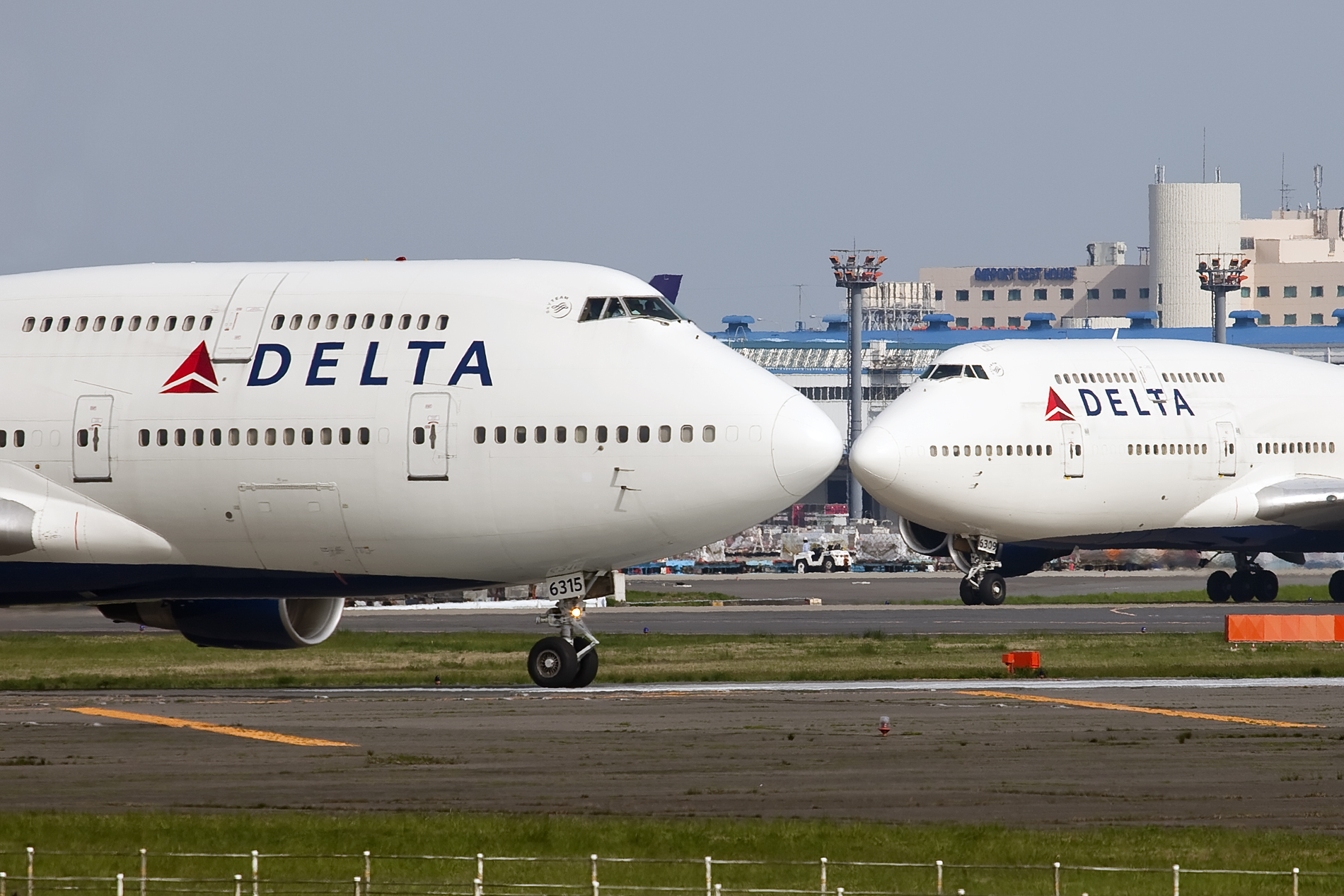 Tokio-Narita